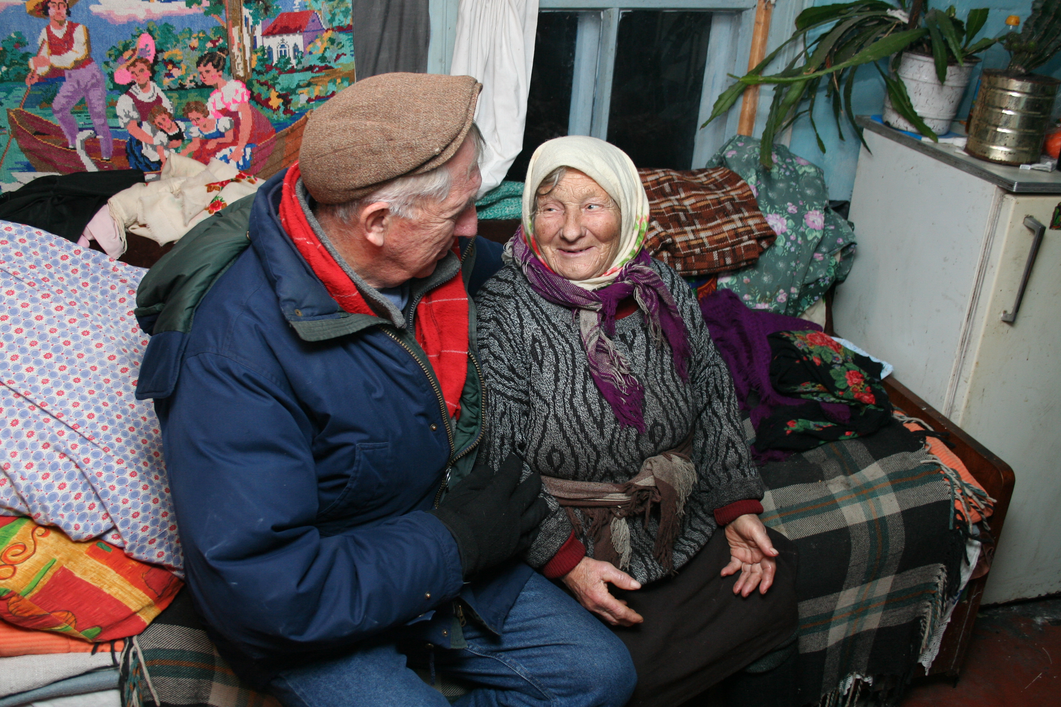 Samosely